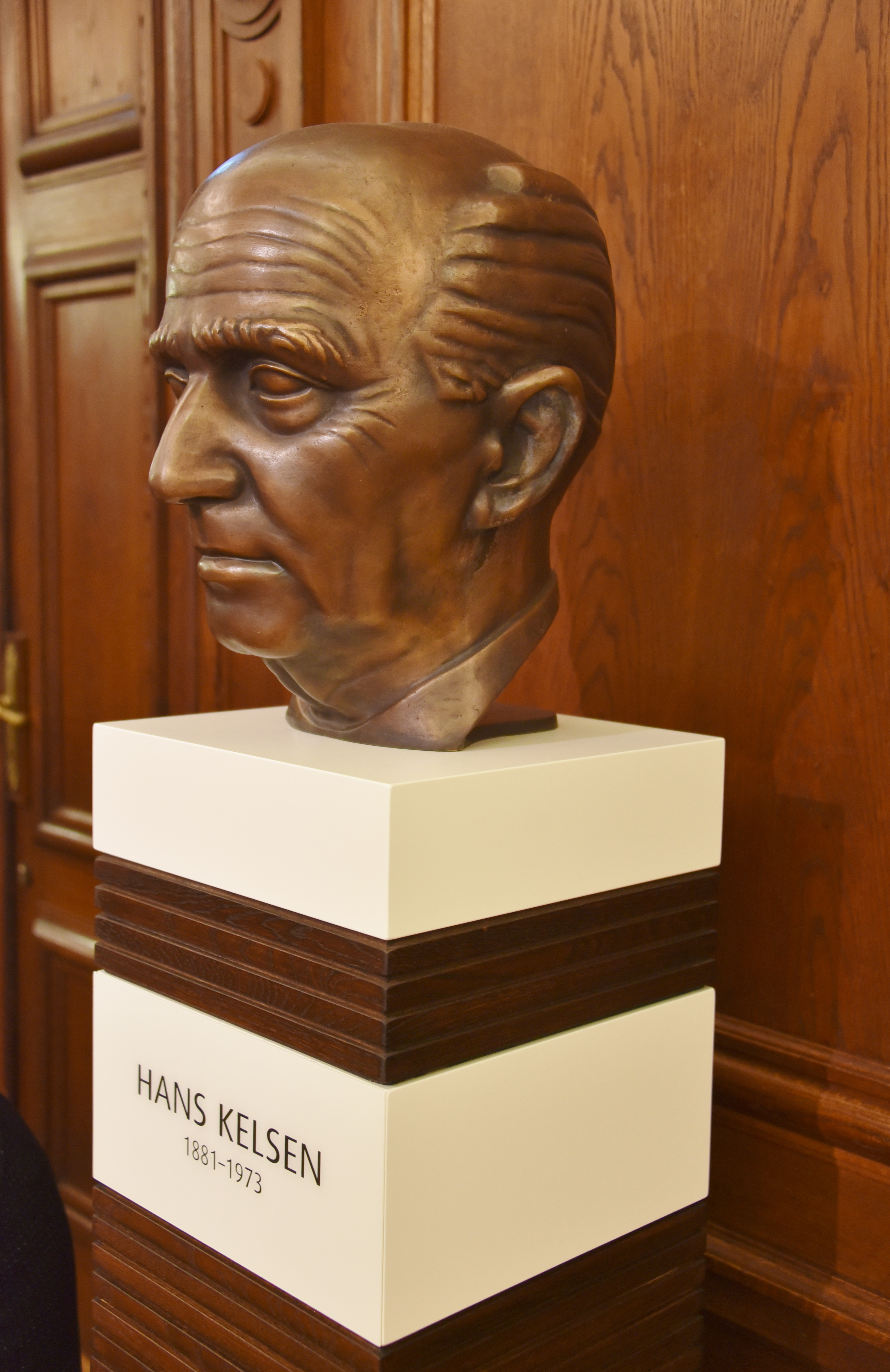 Hans Kelsen Bust Landesgericht Wien